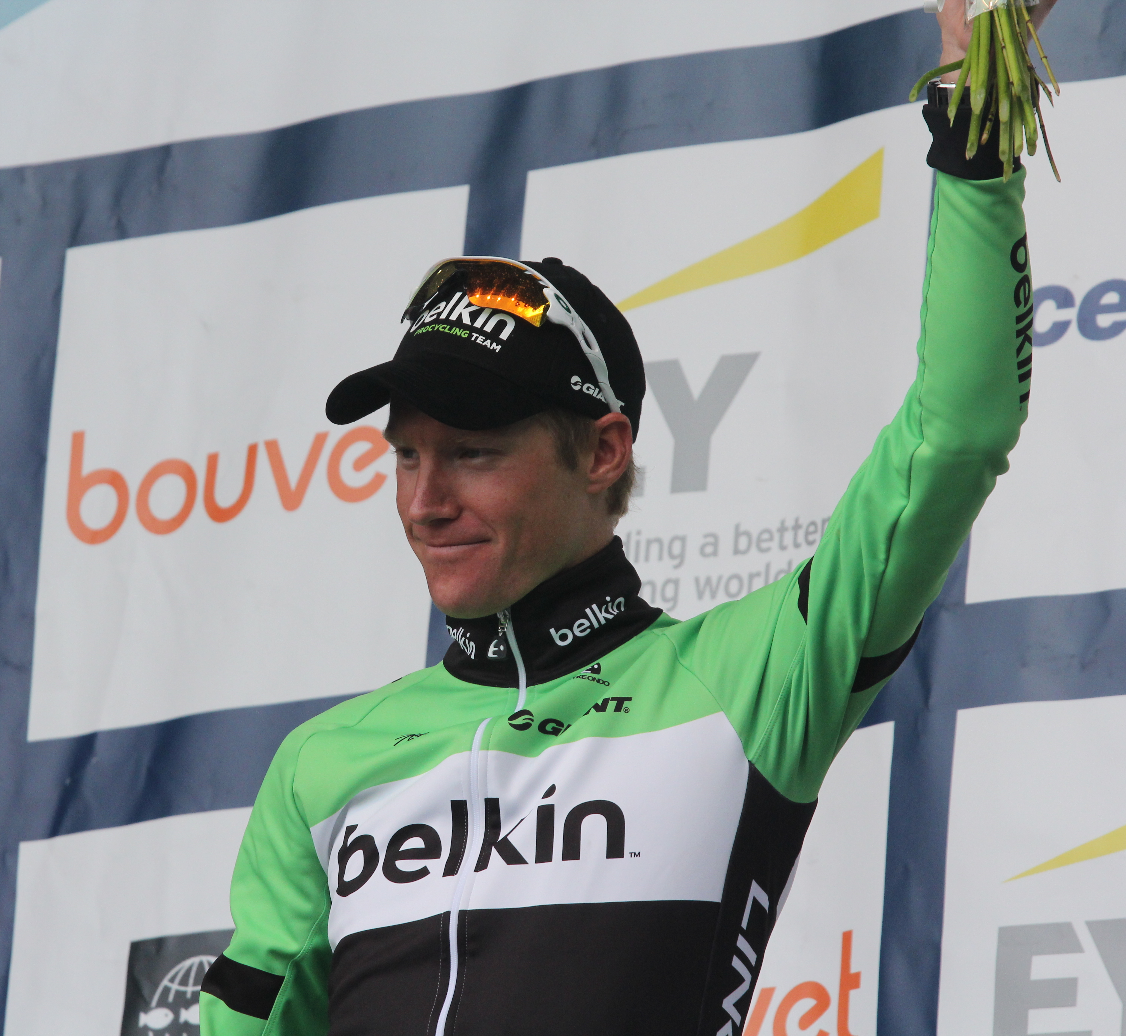 Lars Petter Nordhaug vinner annenplass Tour des Fjords 2013